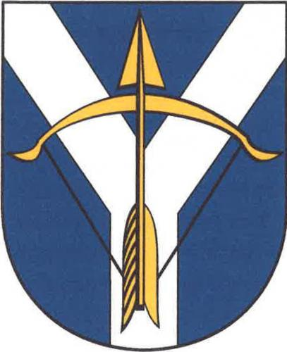 Tuřany CH znak